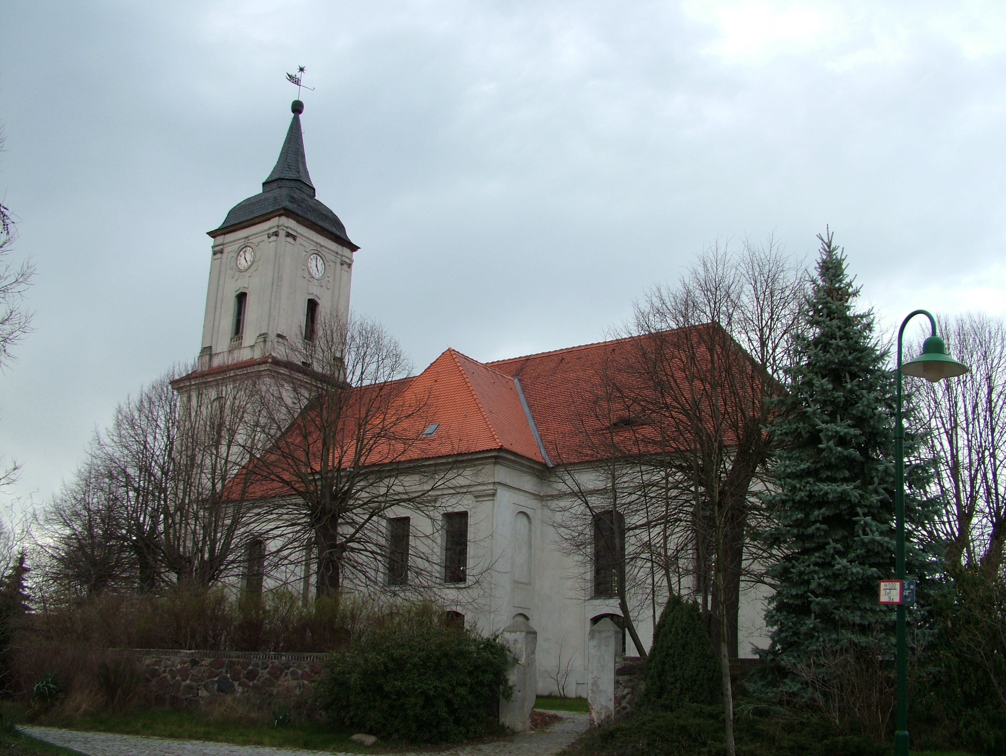 Tucheim in Sachsen-Anhalt. Die Kirche befindet sich an der B 107 im Dorfinneren.